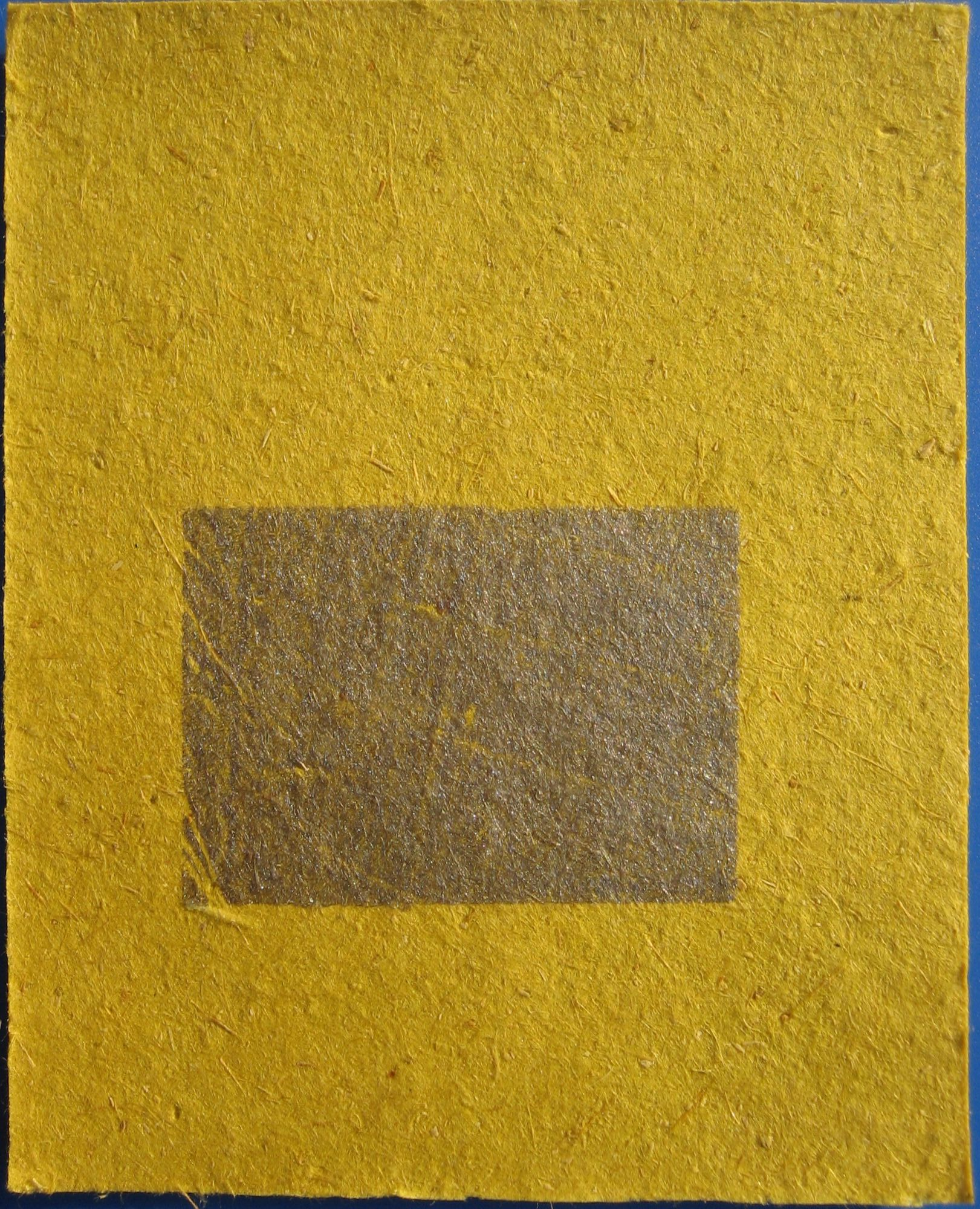 銀類紙錢，一般燒給祖先或者好兄弟；同時也是臺灣民眾祭拜地基主所用紙錢。